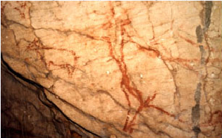 Pintura rupestre en Ayna, Albacete (España)